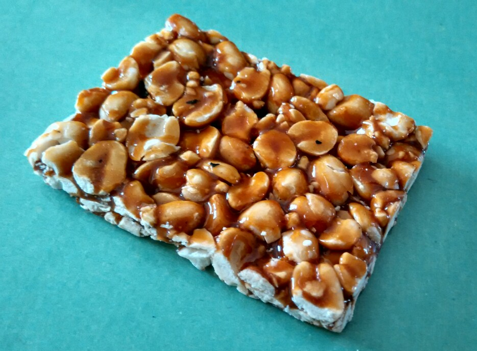 நிலக்கடலை மிட்டாய்